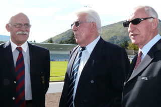 Plusieurs générations du Football Club Lourdais se sont retrouvées dimanche 5 octobre 2008 au stade Municipal Antoine Béguère + des invités ayant opéré contre le prestigieux FCL : le Palois François Moncla, les Dacquois Pierre Albaladejo et Jean-Luc Berot.